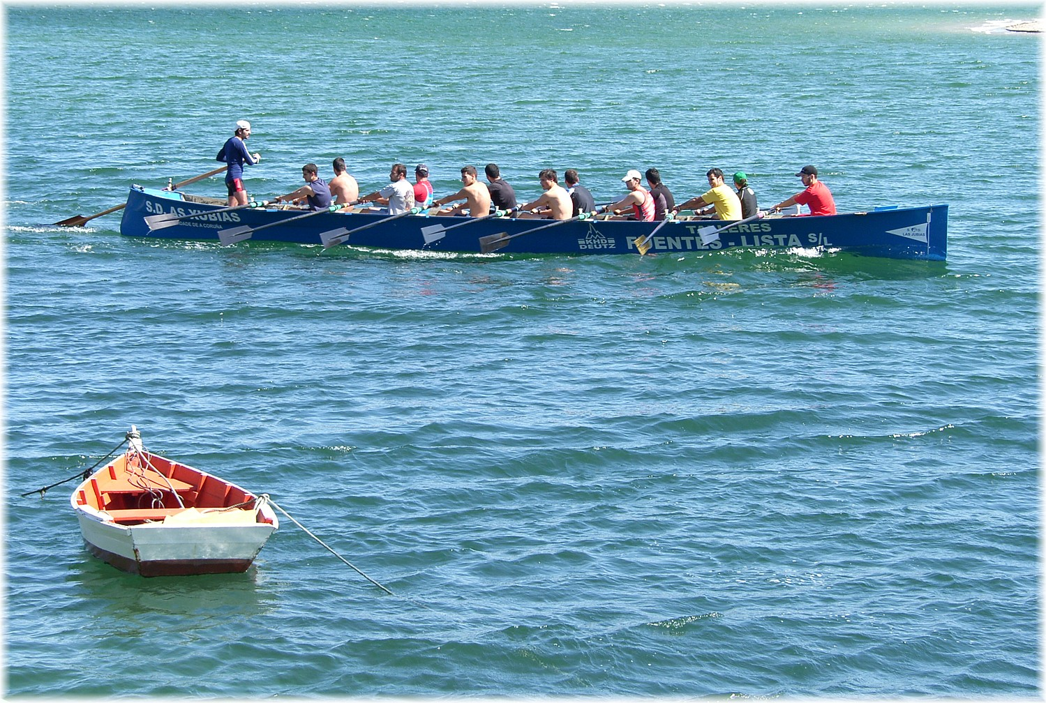 Samsung digital camera......Ria do Burgo (Coruña)